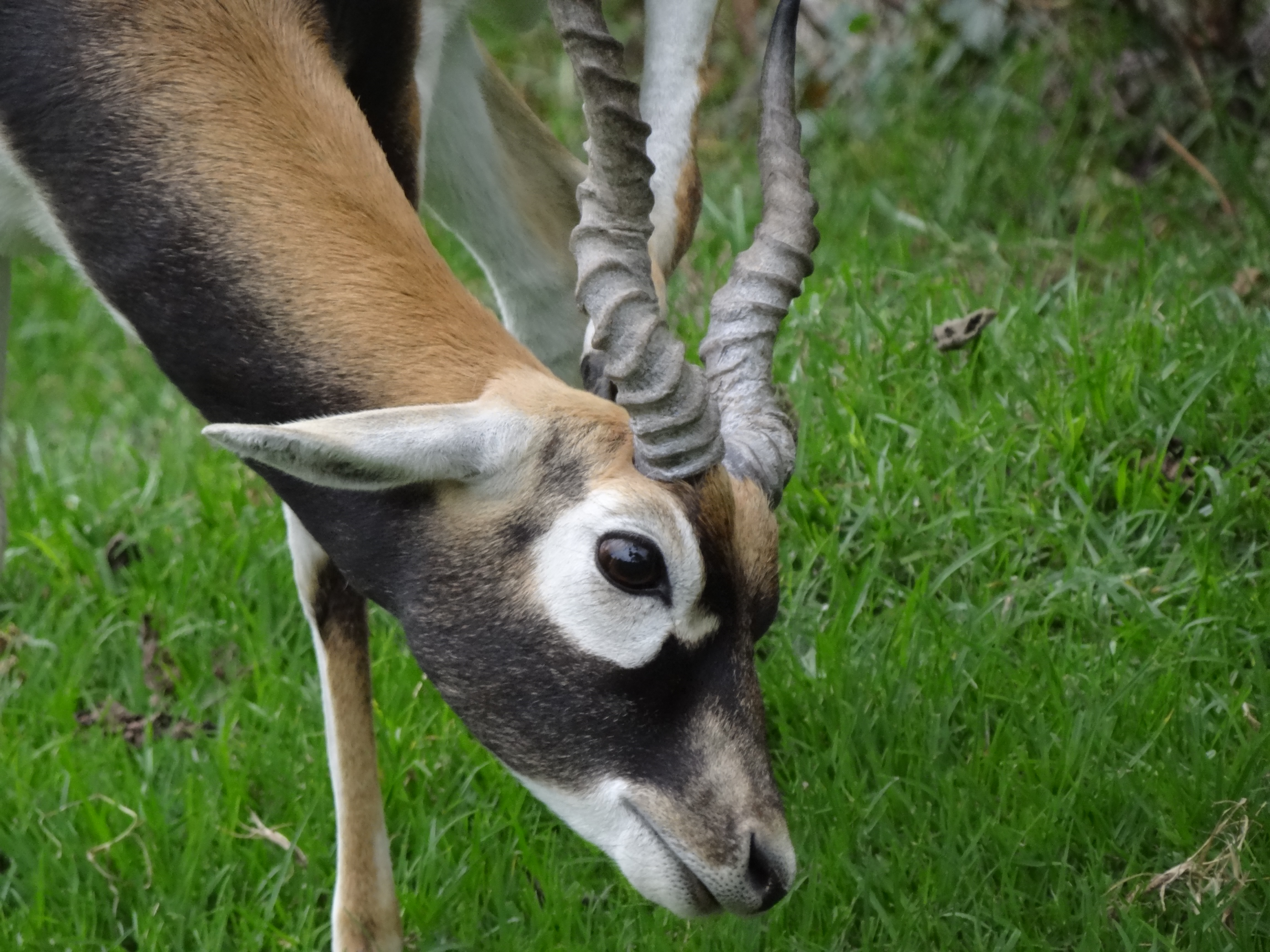 Antílope de la India macho (Antilope cervicapra) en el zoológico de Santacruz, Cundinamarca, Colombia.